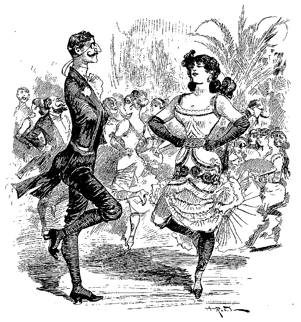 La gigue des salons